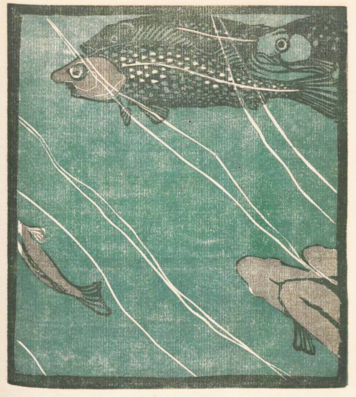 Nora Exner, Fische (Holzschnitt in zwei Platten)